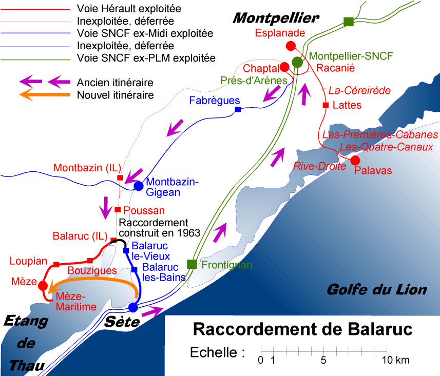 Chemins de fer l'Hérault - Carte du raccordement de Balaruc construit en 1963 pour établir une liaison ferroviaire directe entre Sète et Mèze.